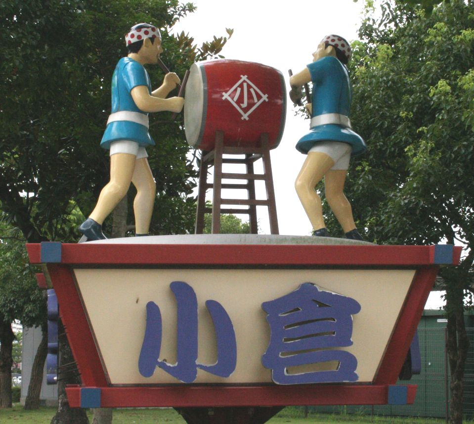 小倉競馬場で2007年までゴール板の装飾として使用された小倉祇園太鼓